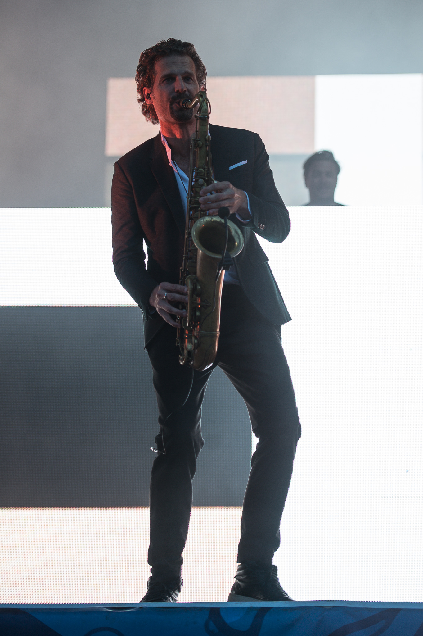 Deichbrand,ESK Events & Promotion GmbH,Festival,Konzert,Livekonzert,Livemusik,Parov Stelar Band,Sea-Airport Cuxhaven/Nordholz,See-Flughafen Cuxhaven/Nordholz,Seeflughafen Cuxhaven/Nordholz